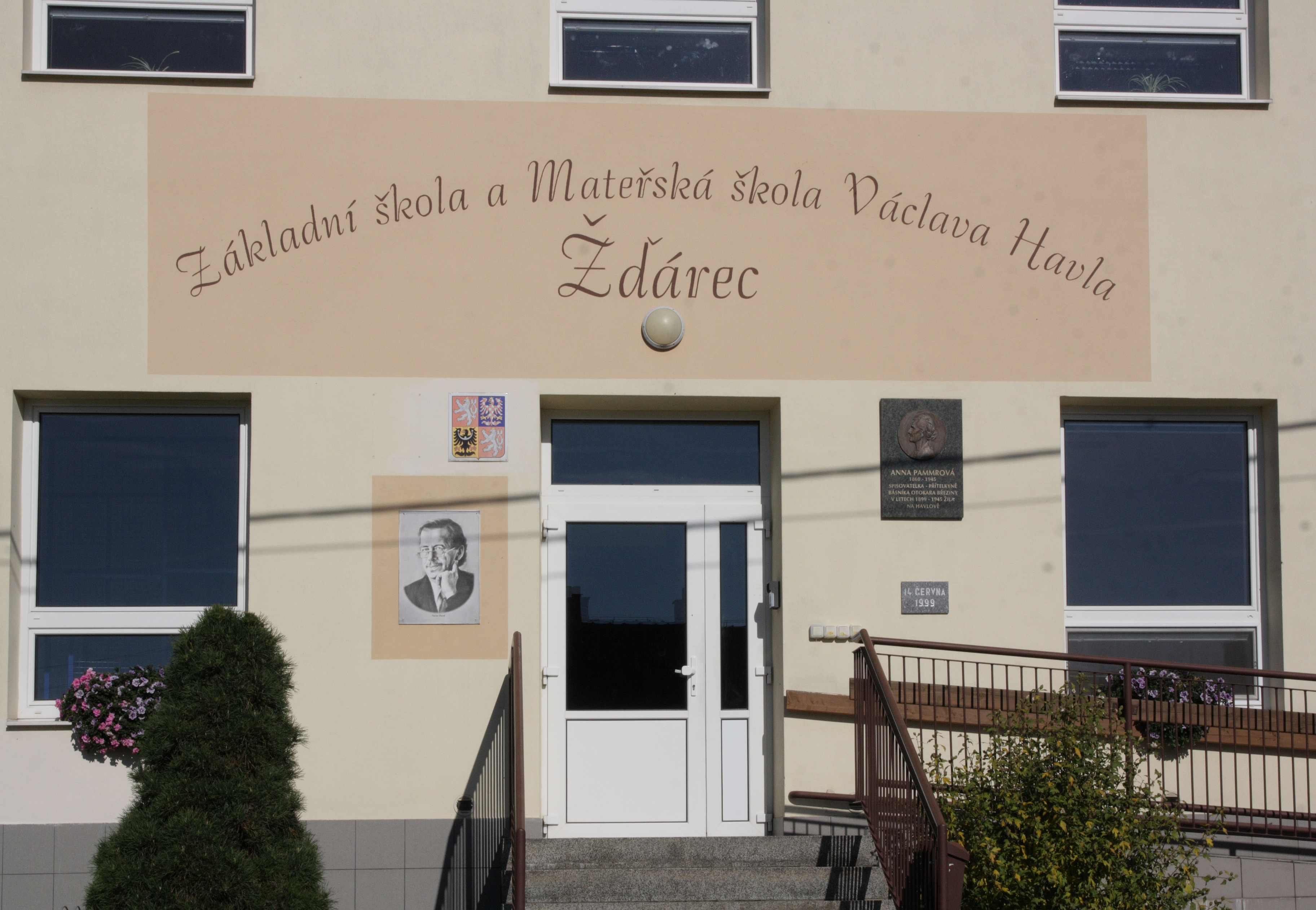 Žďárec - základní a mateřská škola Václava Havla